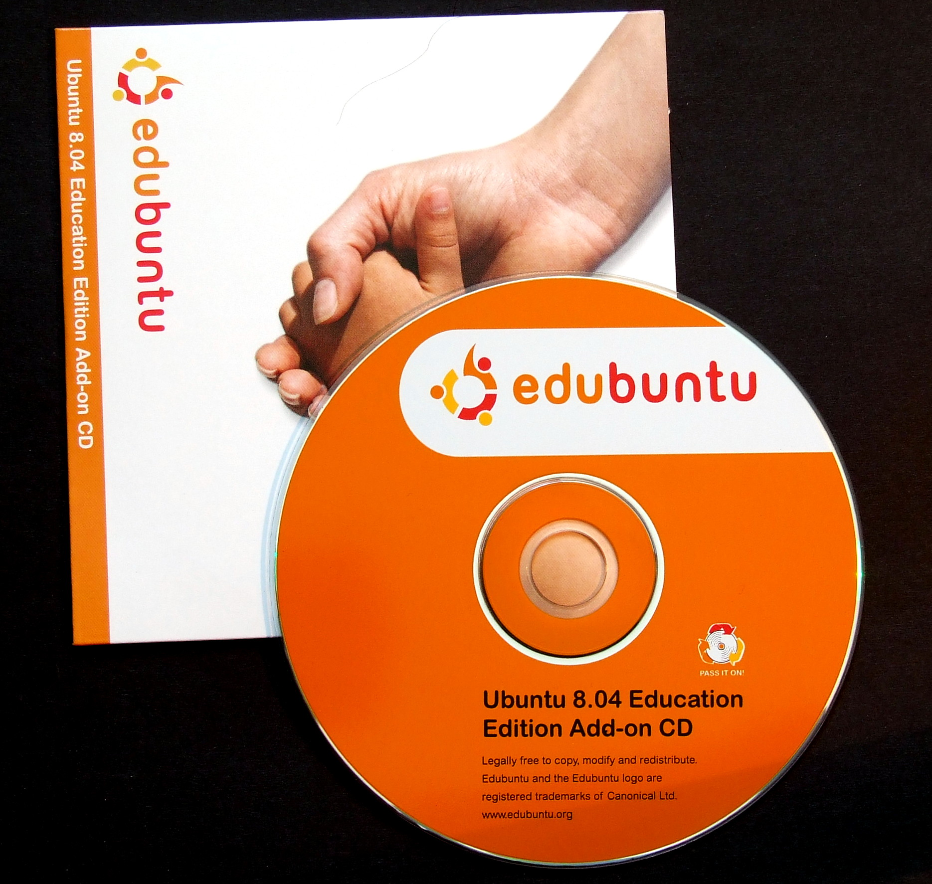 Licensing: This image or multimedia was created by Bartosz Senderek. The image or audio is licensed under CC-BY license. Attribution to me is required. Licencja: Ten obrazek lub plik multimedialny został stworzony przez Barotsza Senderka. Został on udostępniony na licencji CC-BY. Informacja o moim autorstwie jest wymagana. "I want to use the image/multimedia. How can I do that?" You can use this image/multimedia freely for any purpose, including commercial use, provided that you license it under the above license. My suggestion is to use text shown below: If you use the image I would appreciate it if you would let me know on my talk page, but this is not required as long as you follow the above license. "Chcę użyć tego pliku. Jak mogę to zrobić?" Możesz używać tej grafiki/multimediów darmowo w każdym celu, włączając użycie komercyjne, udostępniając go dalej na powyższej licencji. Jeśli zdecydujesz się na publikację zdjęcia mojego autorstwa obowiązkowo podpisz go w sposób podany w sekcji "Licensing text". Jeżeli użyłeś mojego pliku możesz powiadomić mnie o tym na mojej stronie dyskusji, lecz nie jest to wymagane, dopóki trzymasz się powyższej licencji.